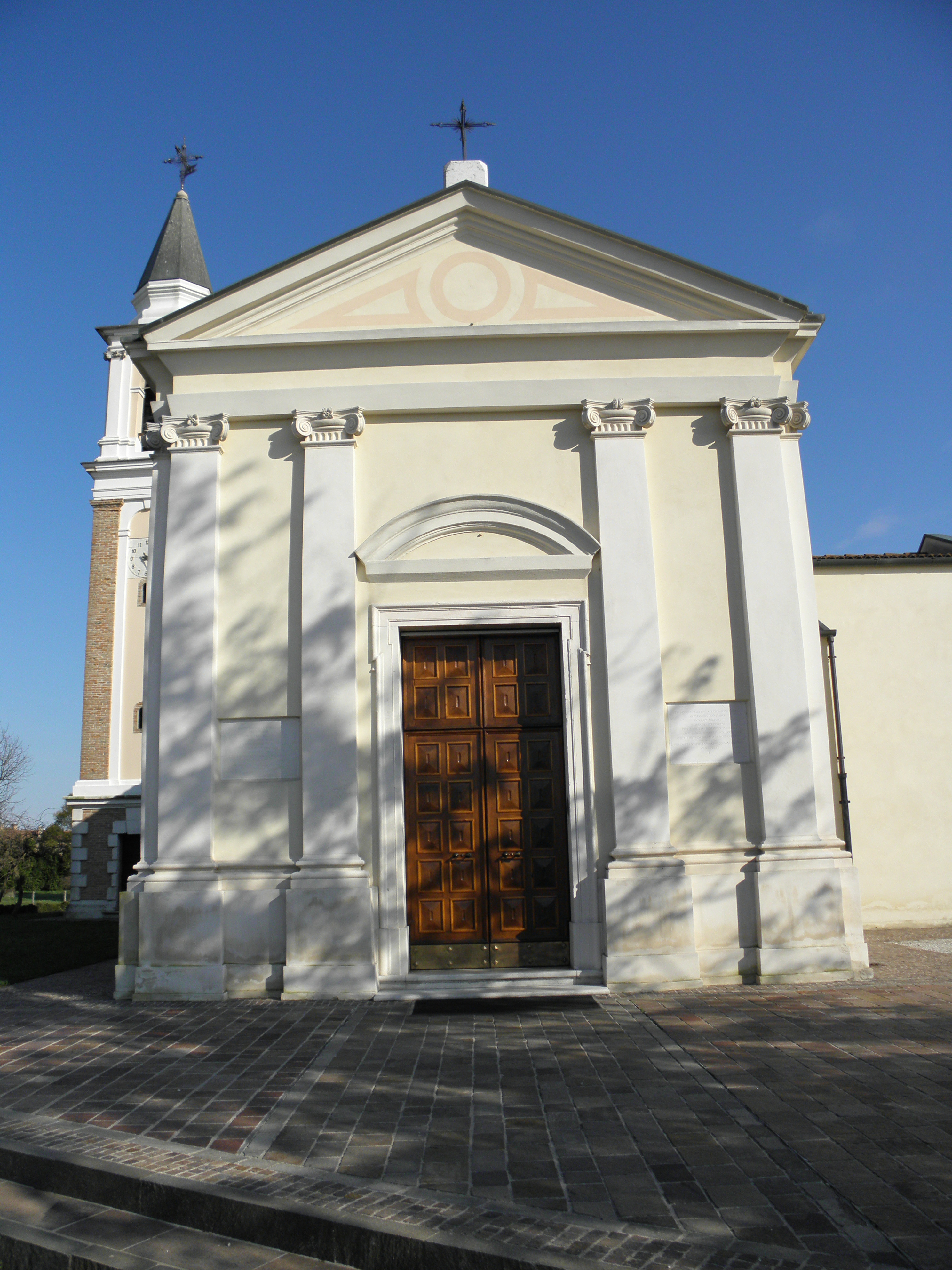 Campoverardo, frazione di Camponogara: la facciata della chiesa parrocchiale dei Santi Quirico e Giulitta.